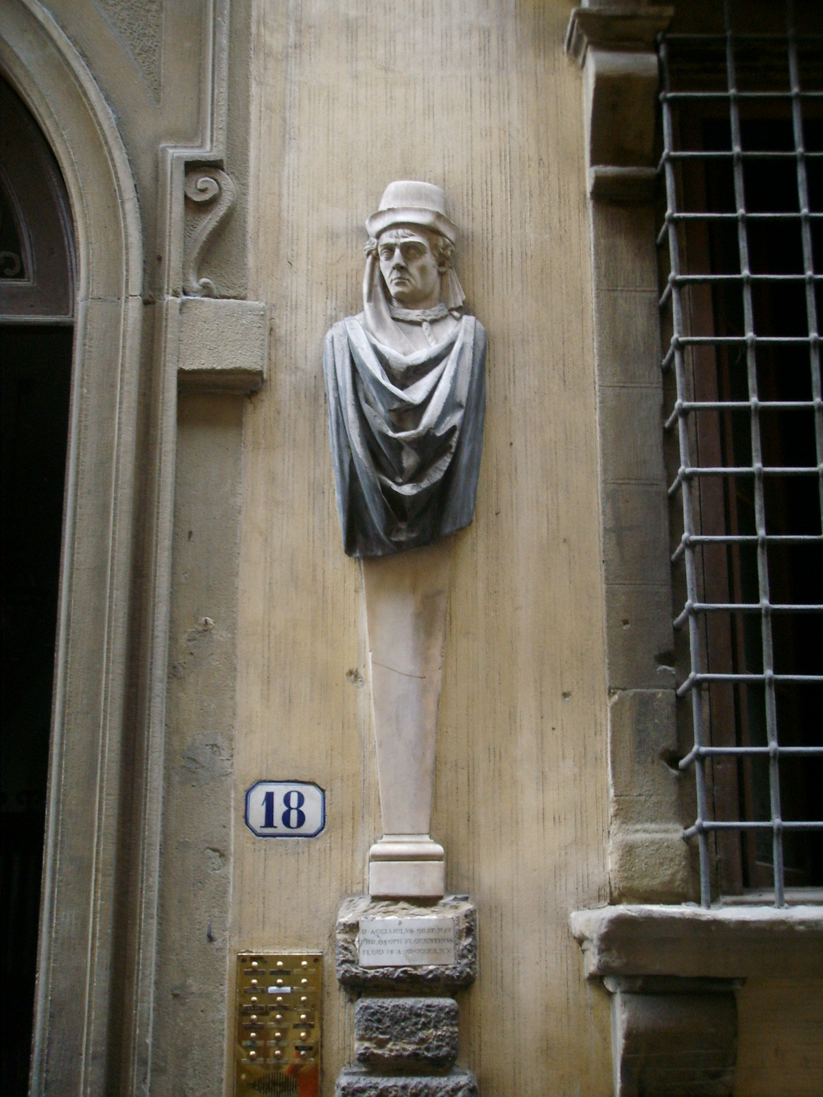 Palazzo dei visacci 05 Donato Acciaiuoli